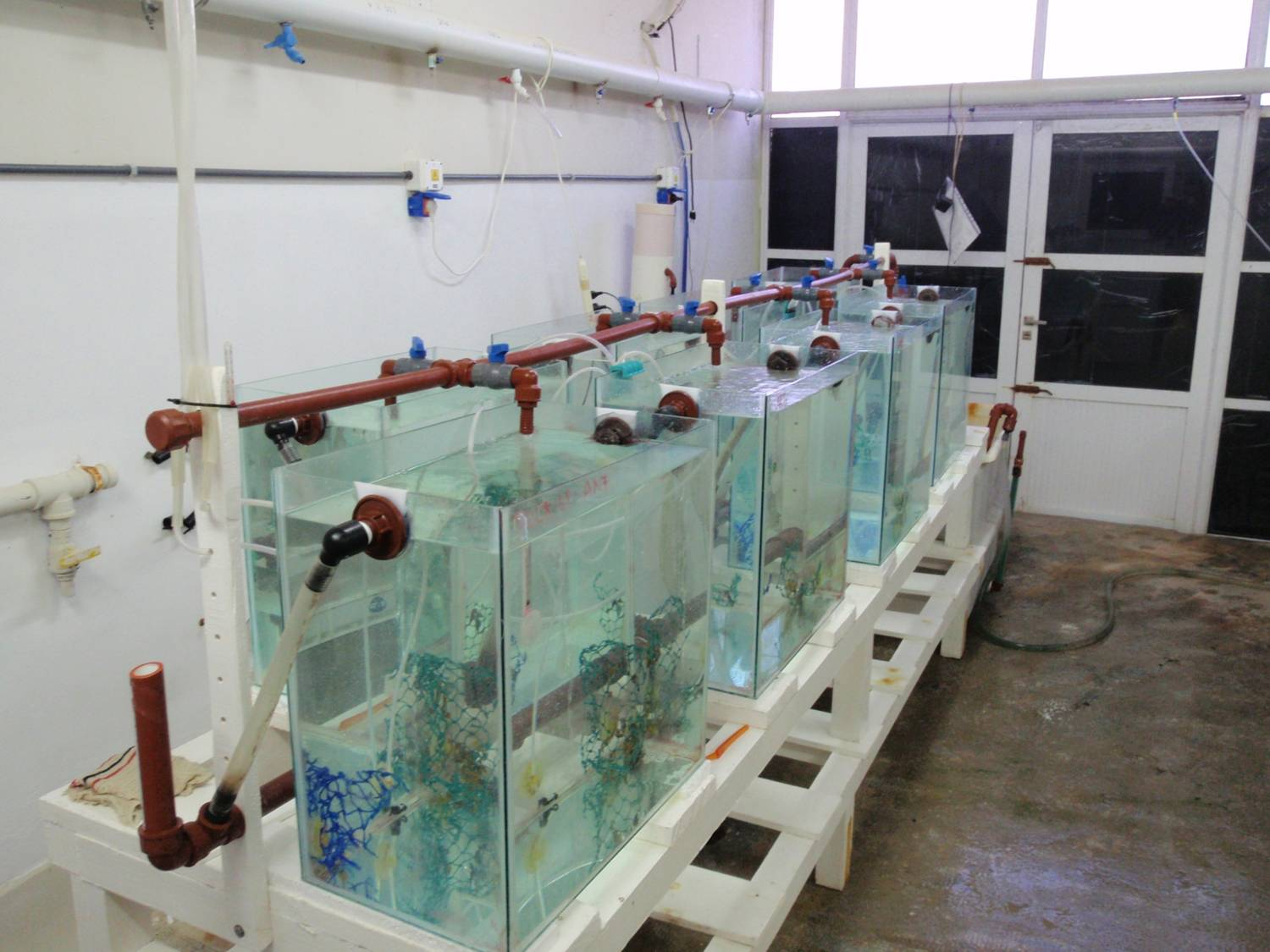 sistemas experimentales de cría de H. patagonicus